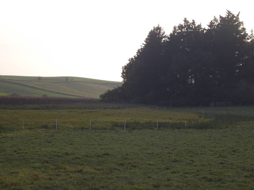 Flächen des Naturschutzgebietes Schlavenkensee.